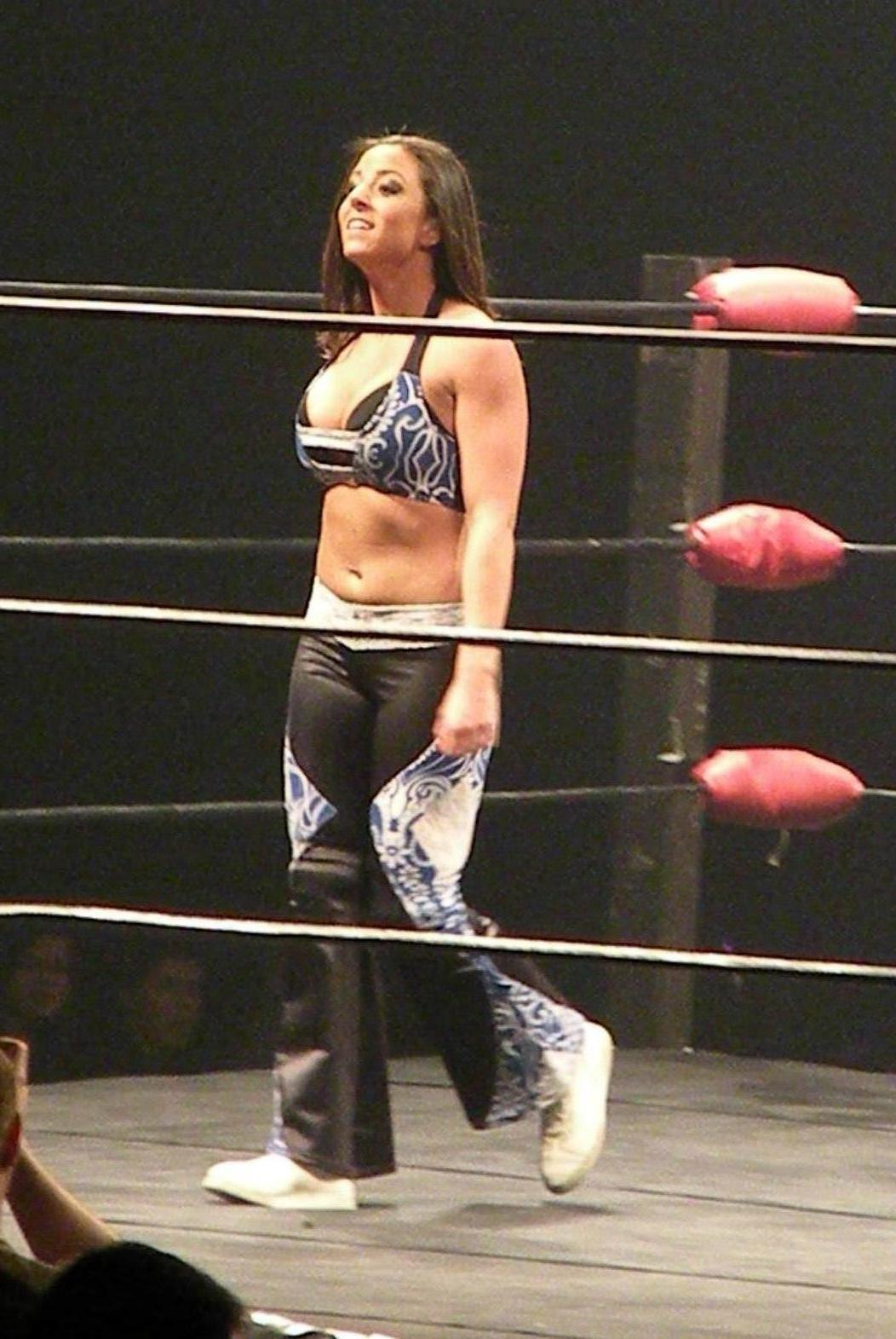 catcheuse serena deeb a american wrestling rampage 2009 paris